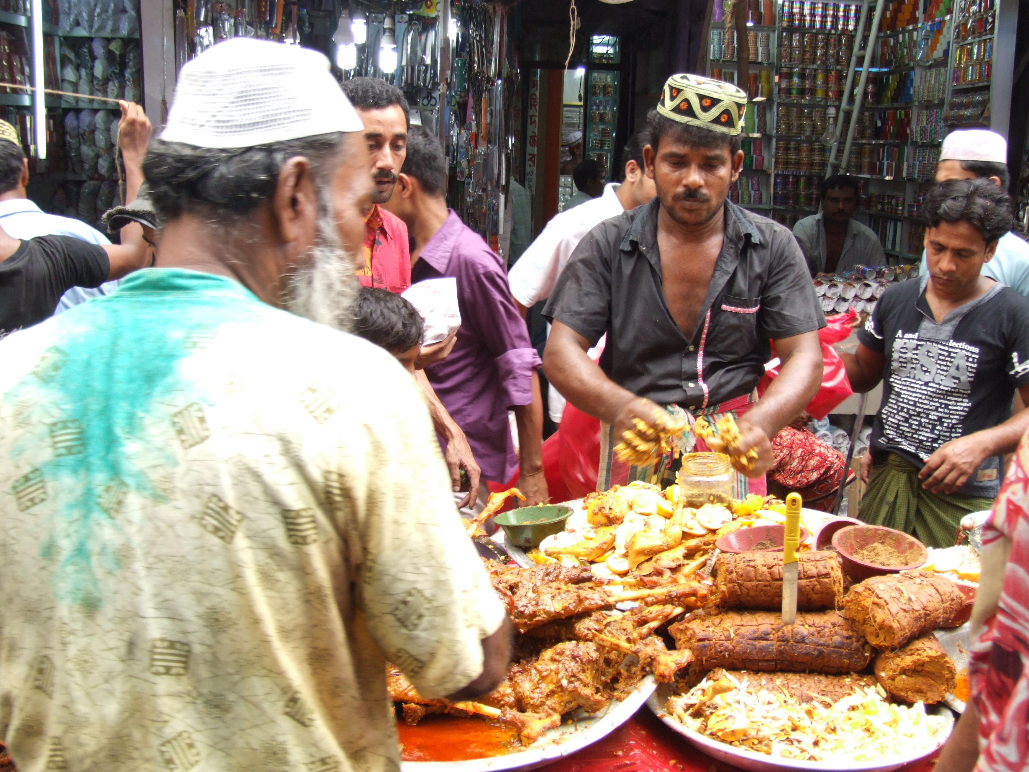 Iftar items available @ puran Dhaka